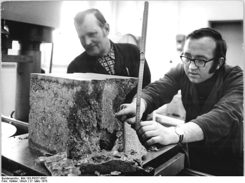 Zeithain, VEB Baustoffwerke Riesa, Test von Leichtbetonsteine ADN-ZB Häßler 27.3.75 Bez.Dresden:Die Verwendung von Kraftwerksasche für die Baustoffindustrie wurde von einer sozialistischen Arbeitsgemeinschaft im VEB Baustoffwerke Riesa, Werk Zeithain, in einer Forschungsarbeit erfolgreich behandelt.Inzwischen läuft die Produktion der Leichtbetonsteine, die sich durch eine gute Wärmedämmung auszeichnen.Technologe Karl-Friedrich Michel und TKO-Leiter Walter Guckland-hier bei einem Festigkeitsversuch-haben in der Betriebssektion der Kammer der Technik an diesem Projekt mitgearbeitet.(vergl.dazu P0327-6N)